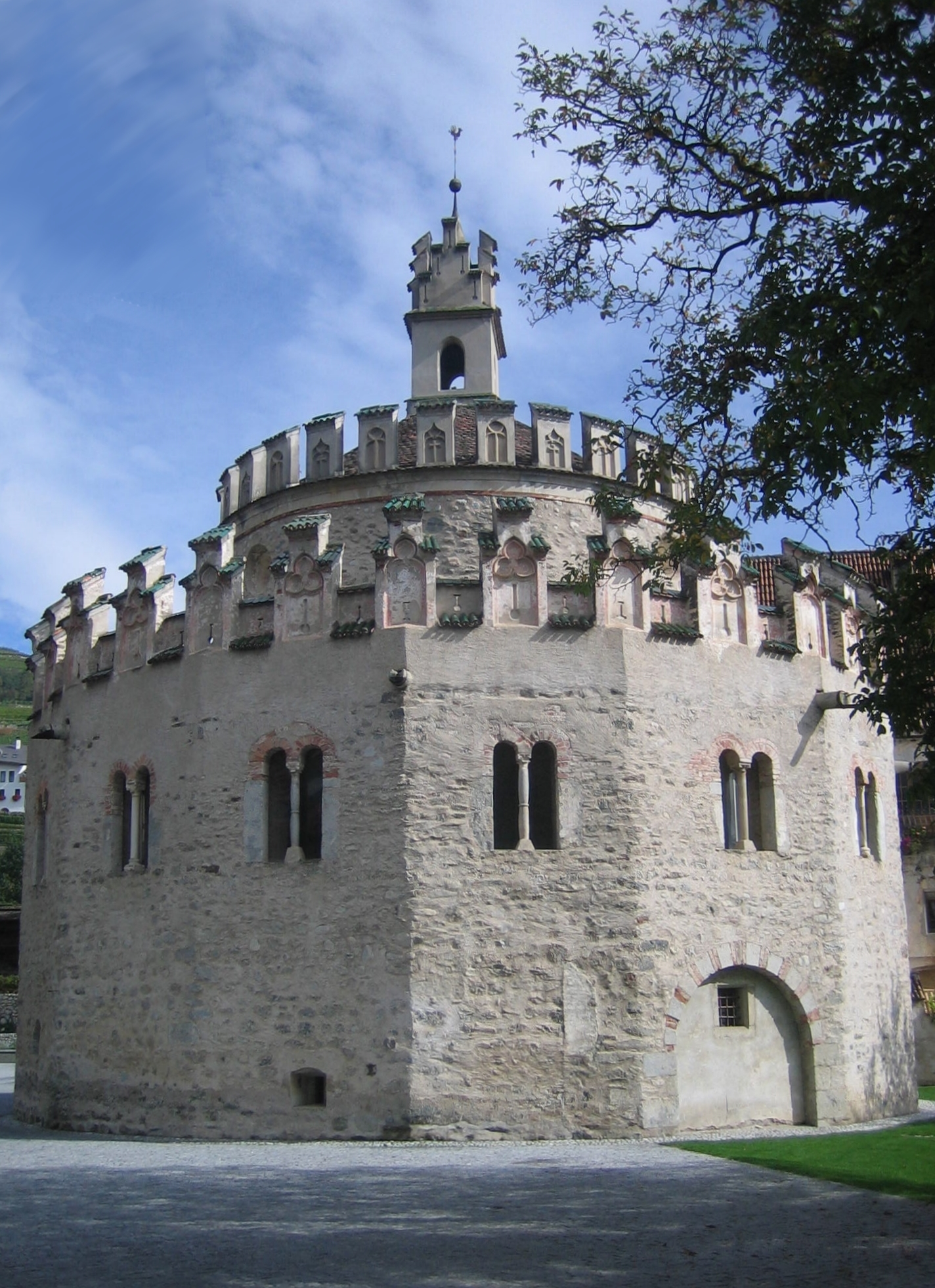 Die Michaelskapelle bzw. Engelsburg beim Kloster Neustift in Südtirol